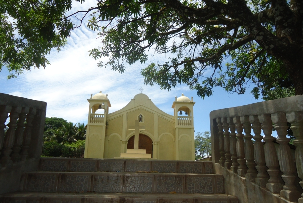 Iglesia catolica Jiquinlaca Concepcion Intibuca